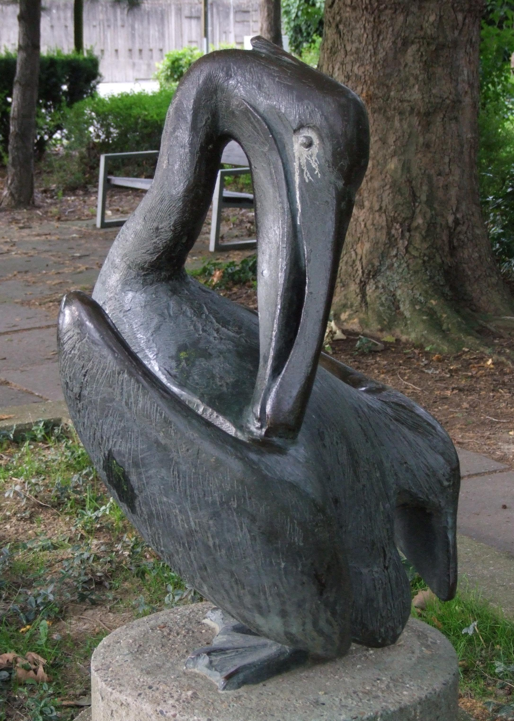 Pelikanstatue (1978) in Königswinter-Niederdollendorf am Rheinufer – Bronzeplastik von Ernemann Sander